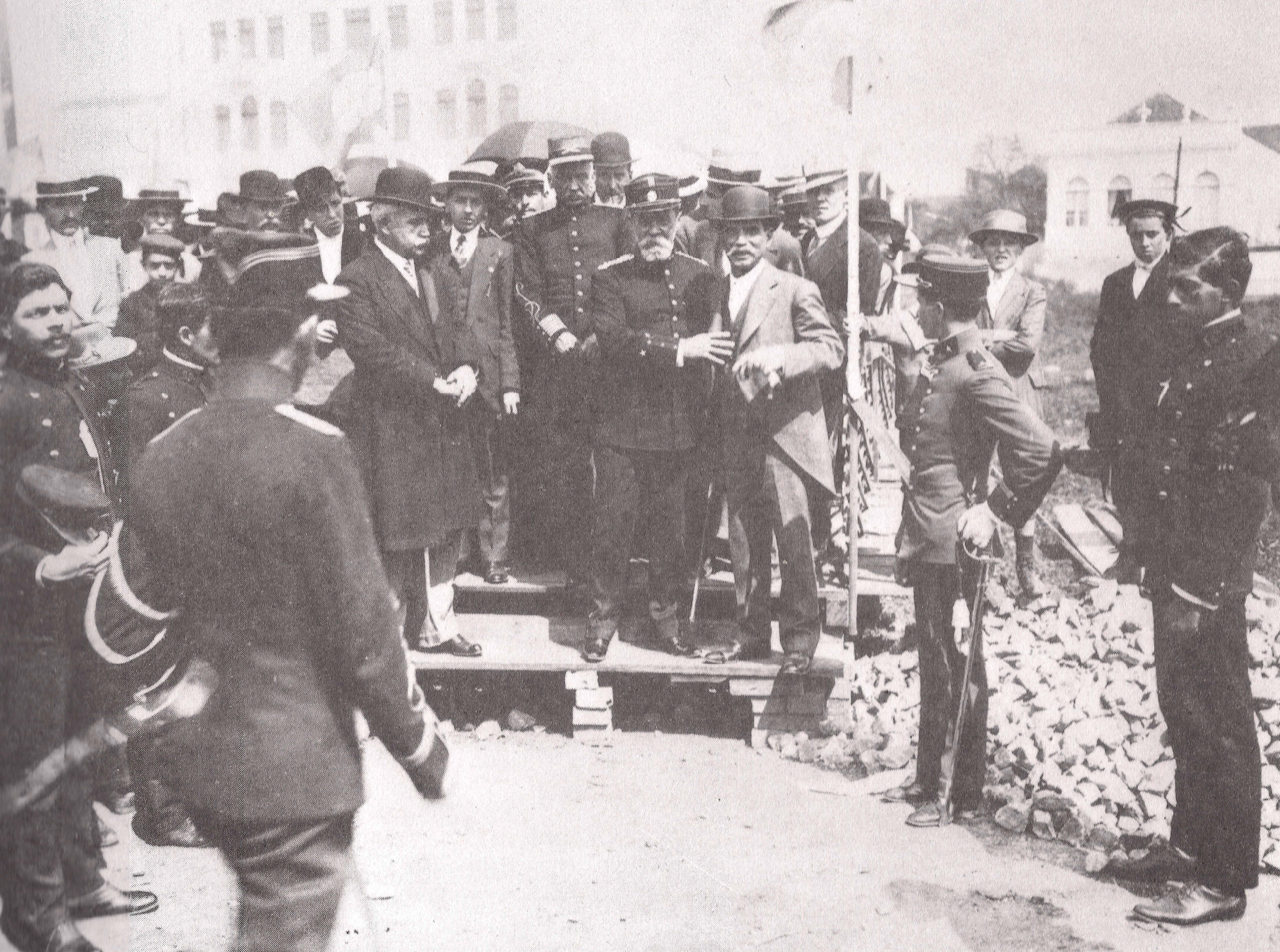 pedra fundamental do prédio ufpr